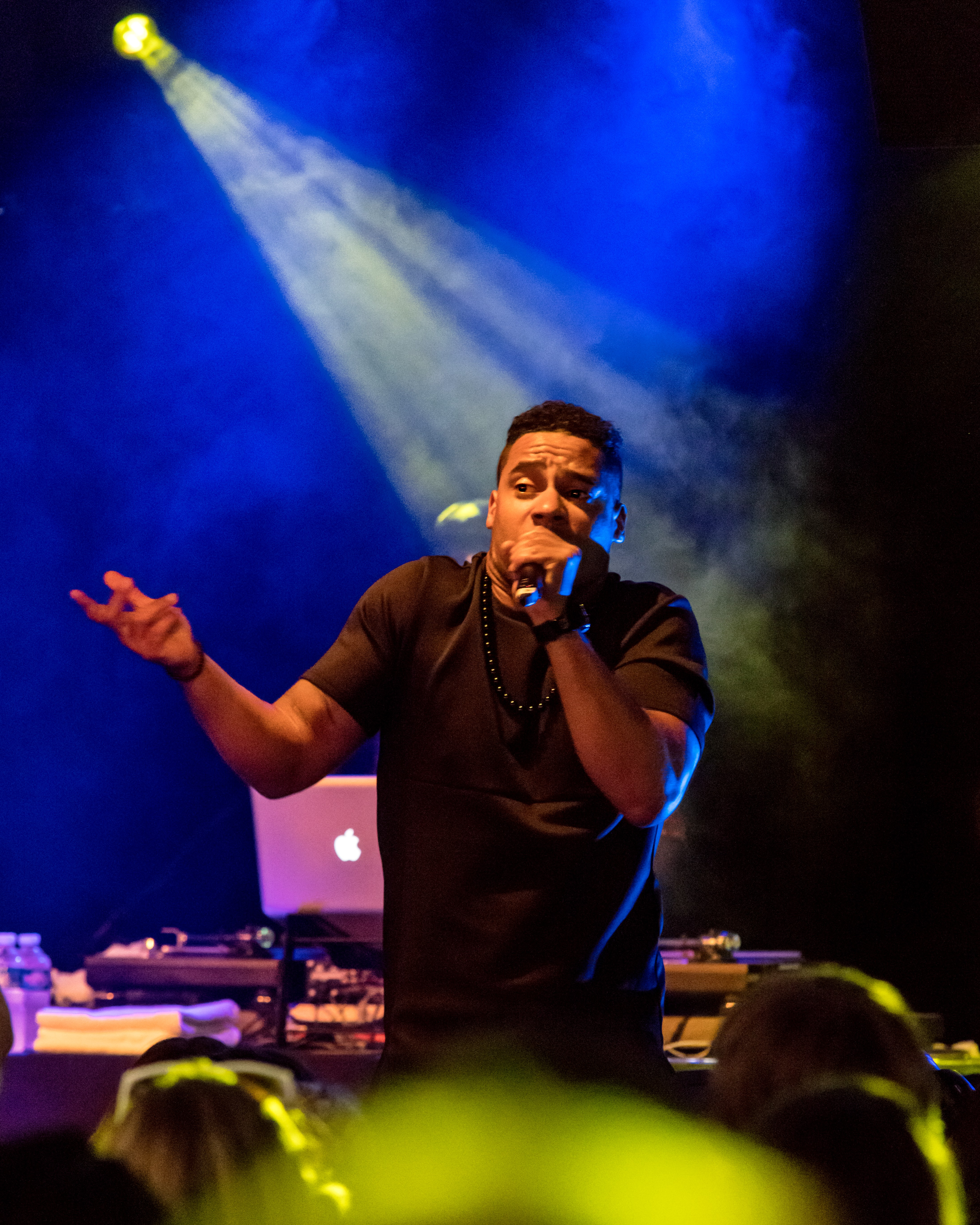 Bilder vom Zelt Musik Festival 2017 in Freiburg im Breisgau Megaloh am 19.07.2017